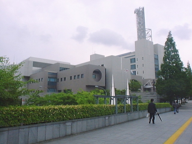 Tsukuki-ku Ward Office, Tsuzuki-ku, Yokohama, Kanagawa, Japan (都筑区役所)